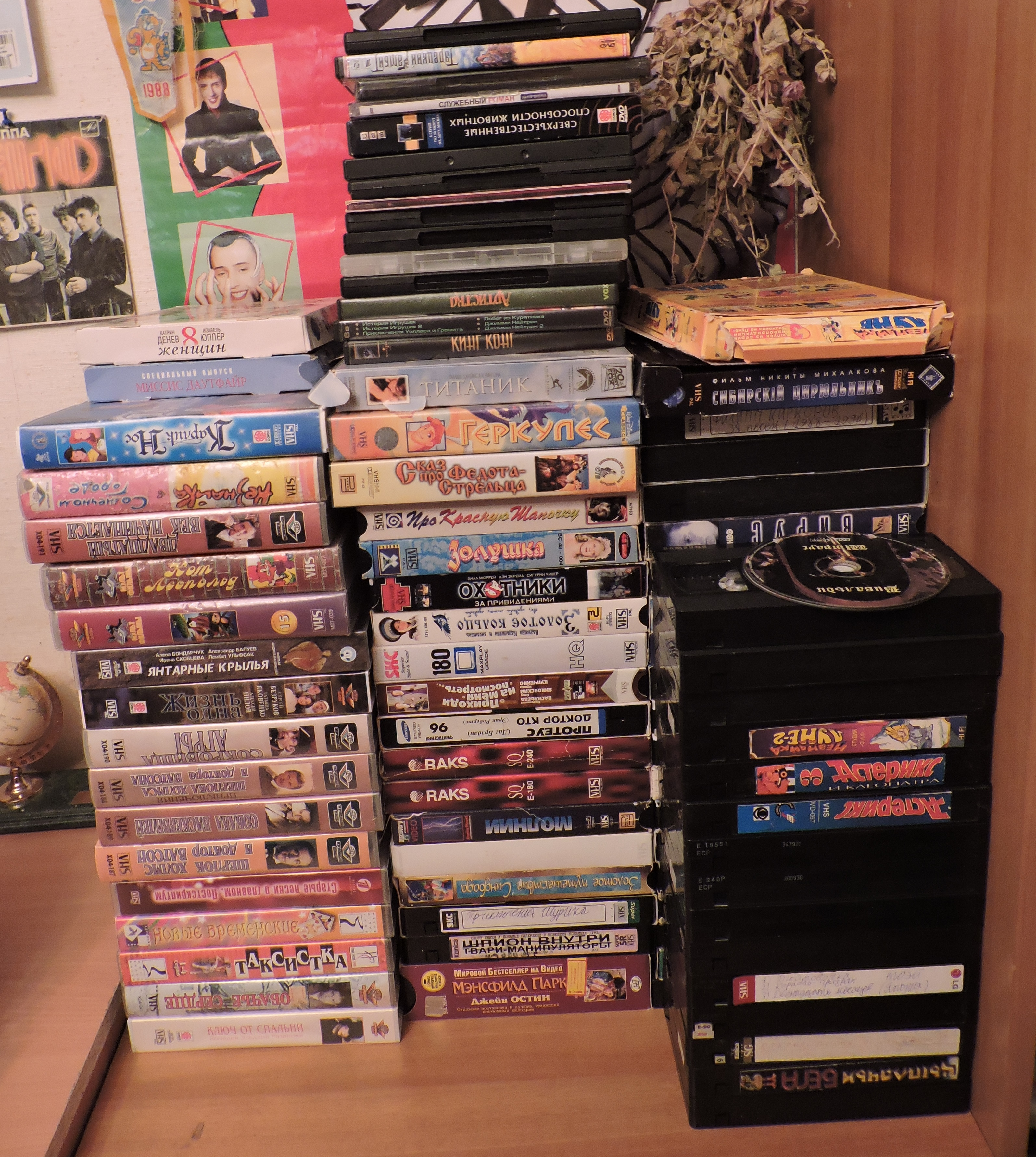 Моя коллекция видеокассет!!! Накоплена ещё с 90-х гг.!!